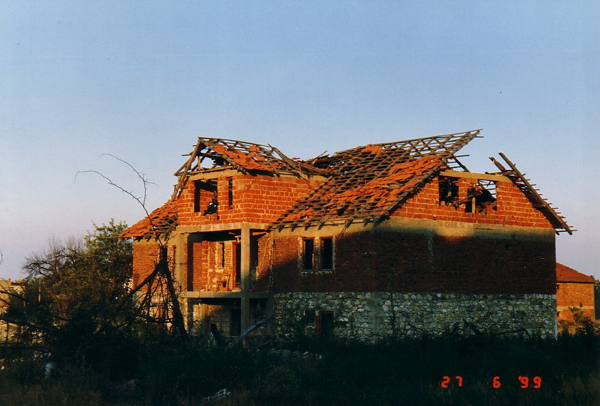 Kosovo, 1999